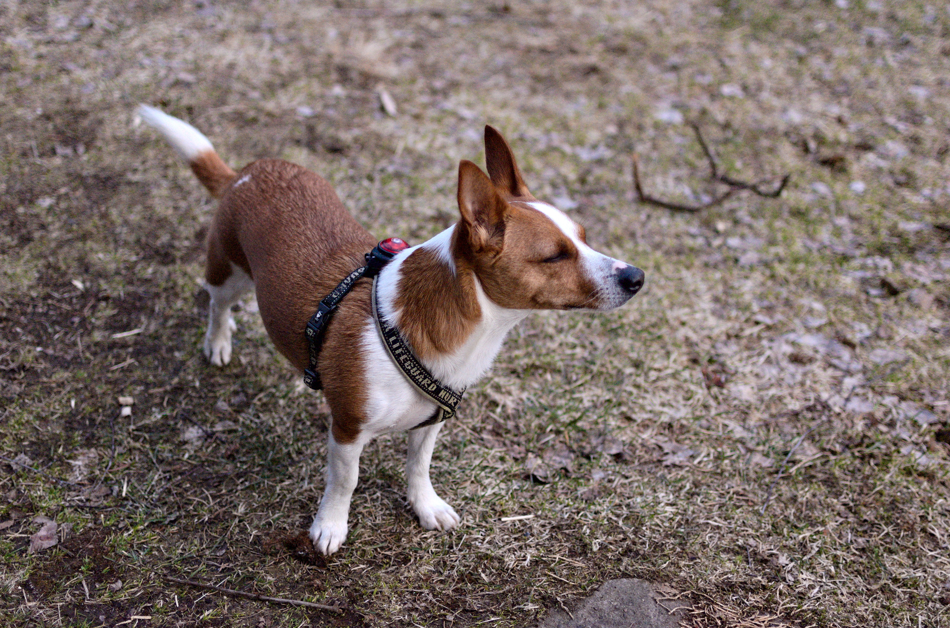 Sileäkarvainen pieni portugalinpodengo 'Ruusa'